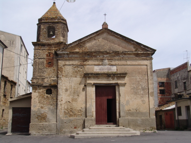 immagine di cutro. foto personale di cui autorizzo la pubblicazione.